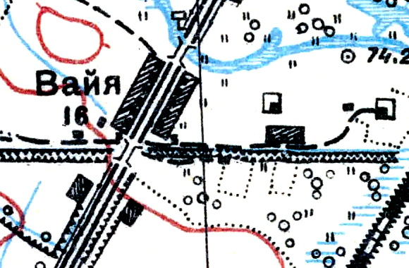 Топографическая карта Ленинградской области, квадрат О-36-13-А-б (Пос. Тайцы), деревня Вайя